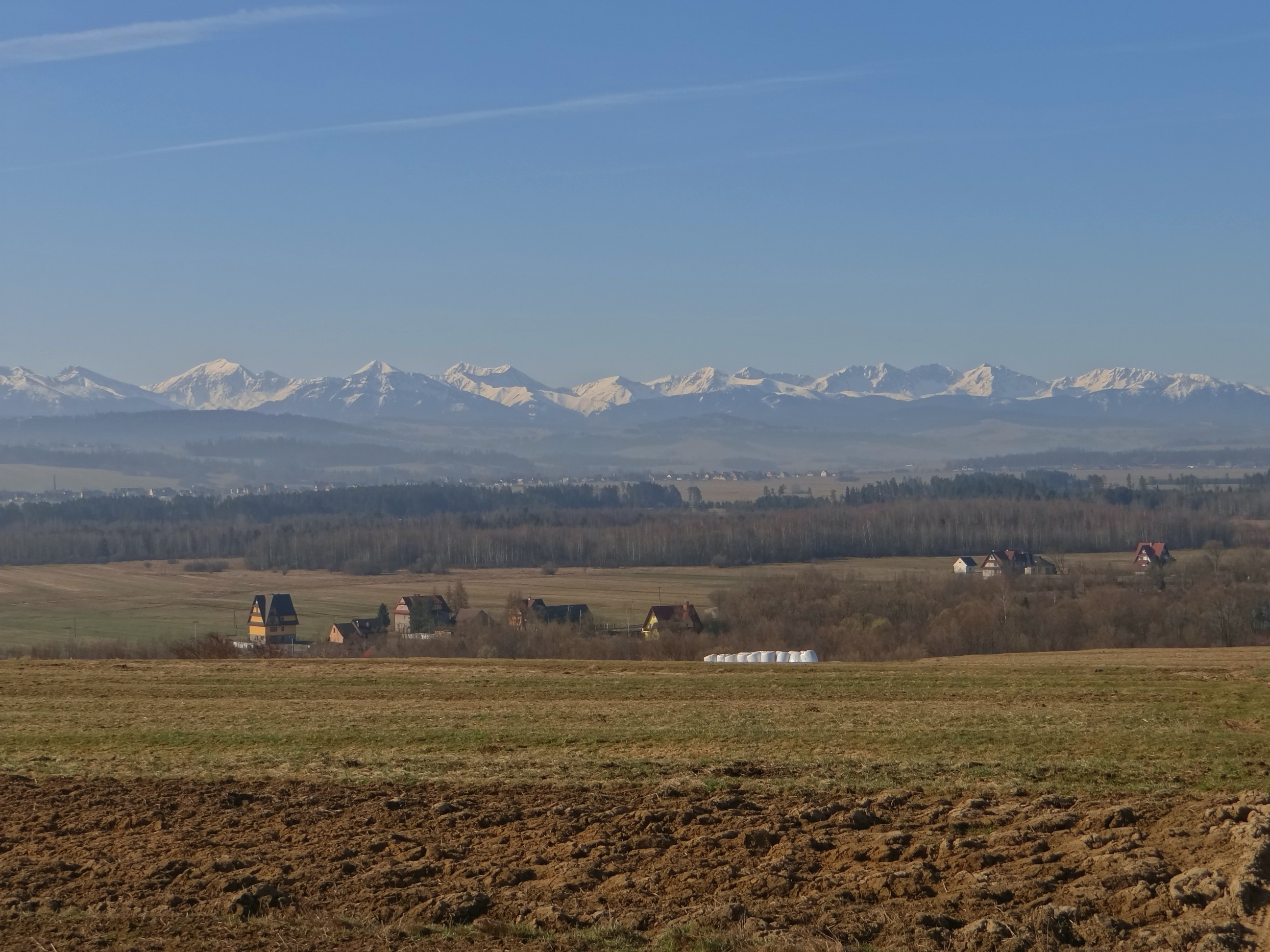 Krauszów, widok ogólny na Kotlinę nowotarską i Tatry